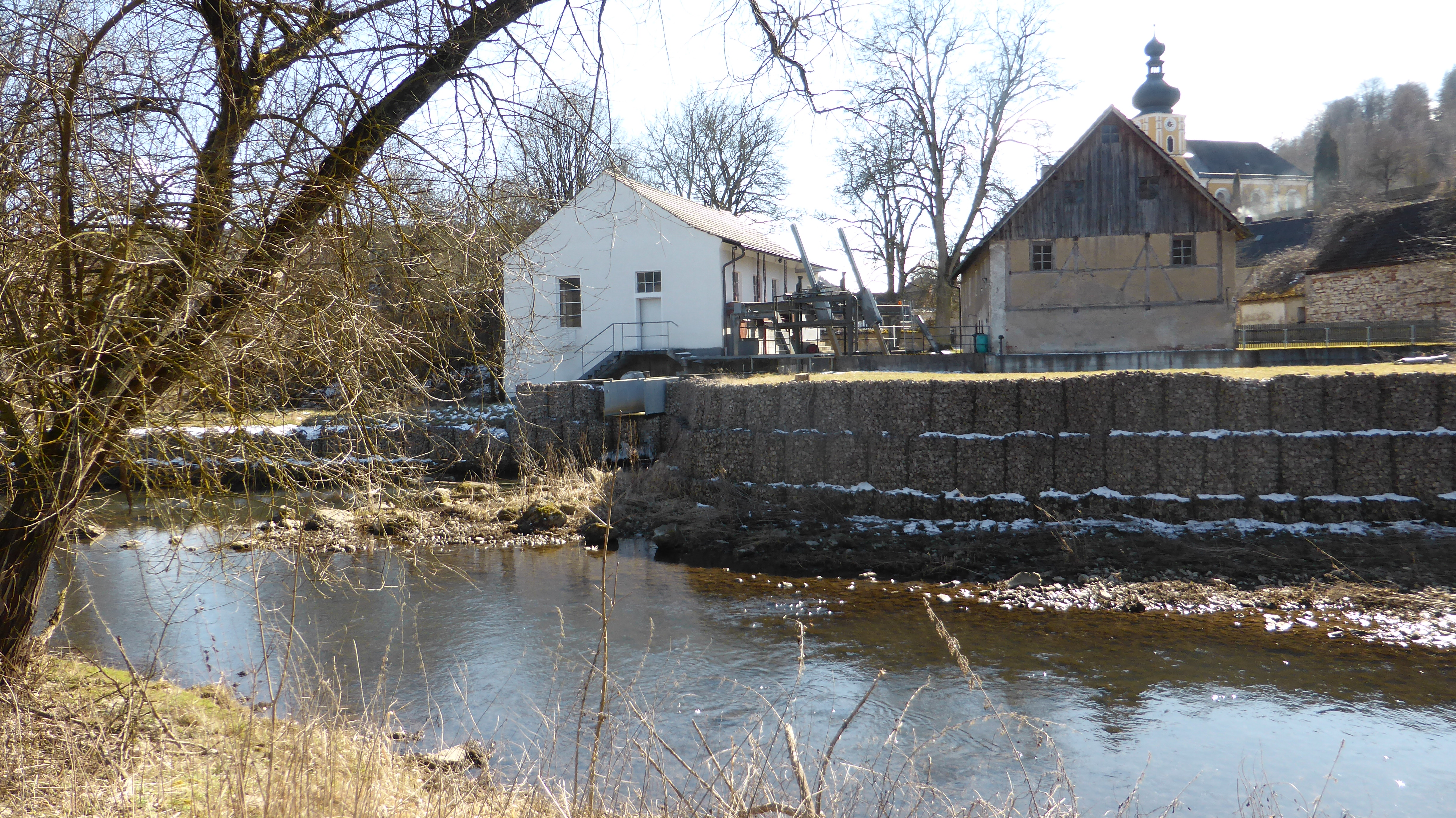 Wehranlagen von Schloss Dietldorf (Burglengenfeld)